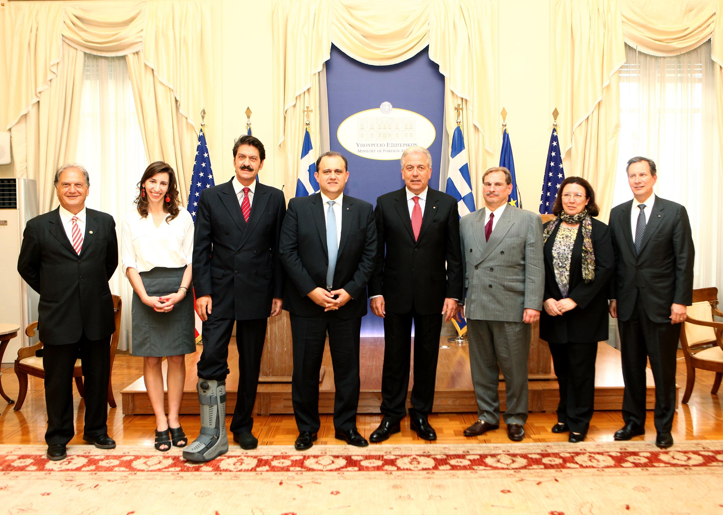 Την Δευτέρα 13 Μαΐου 2013, ο Υπουργός Εξωτερικών Δημήτρης Αβραμόπουλος είχε συνάντηση στο Υπουργείο Εξωτερικών με τον Πρόεδρο και μέλη του Διοικητικού Συμβουλίου της Ελληνοαμερικανικής Οργάνωσης American Hellenic Institute (AHI).